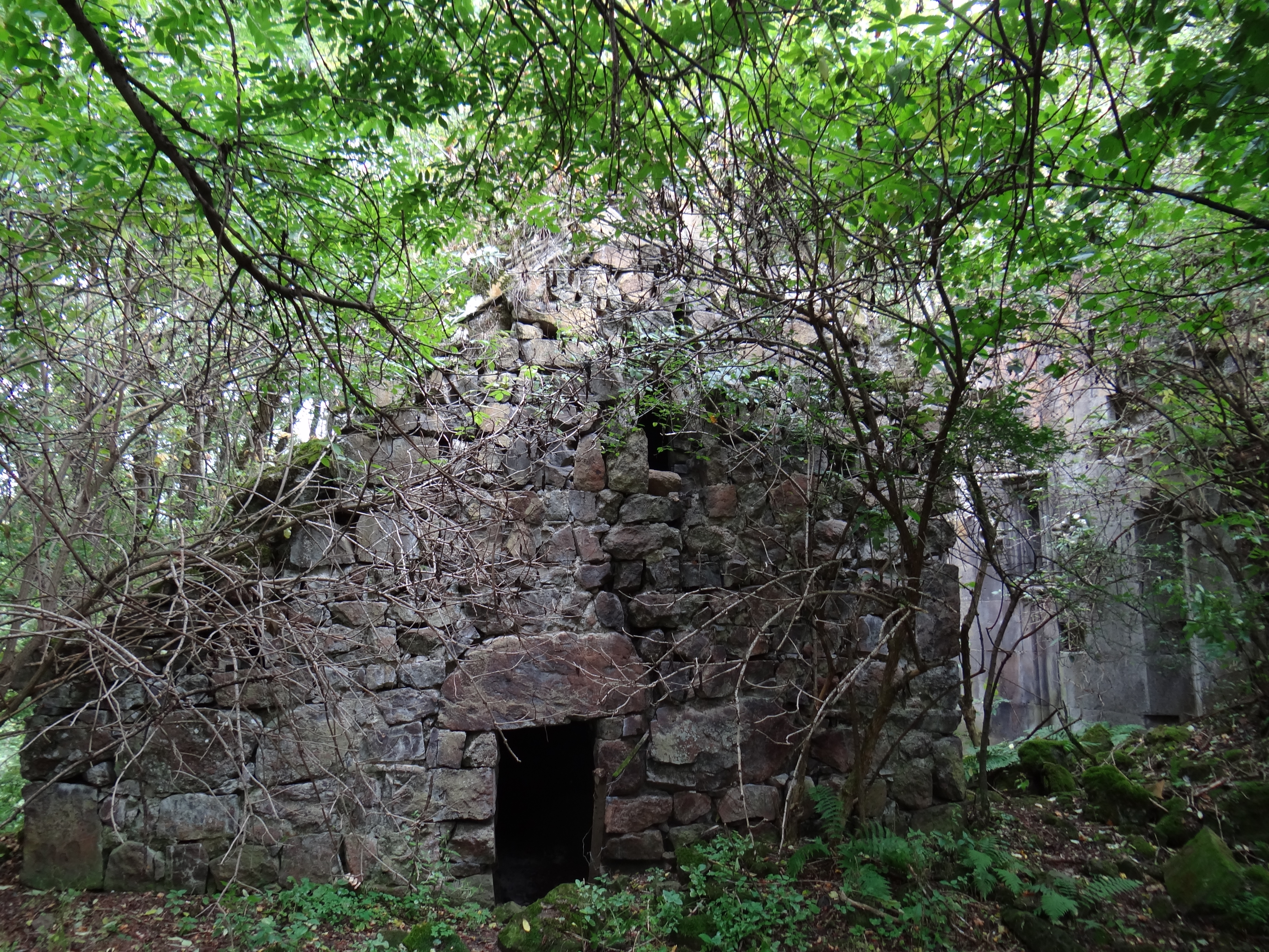 Վանական համալիր «Դեղձնուտ» Լուսանկարը Դավիթ Դավթյանի 8/8.3